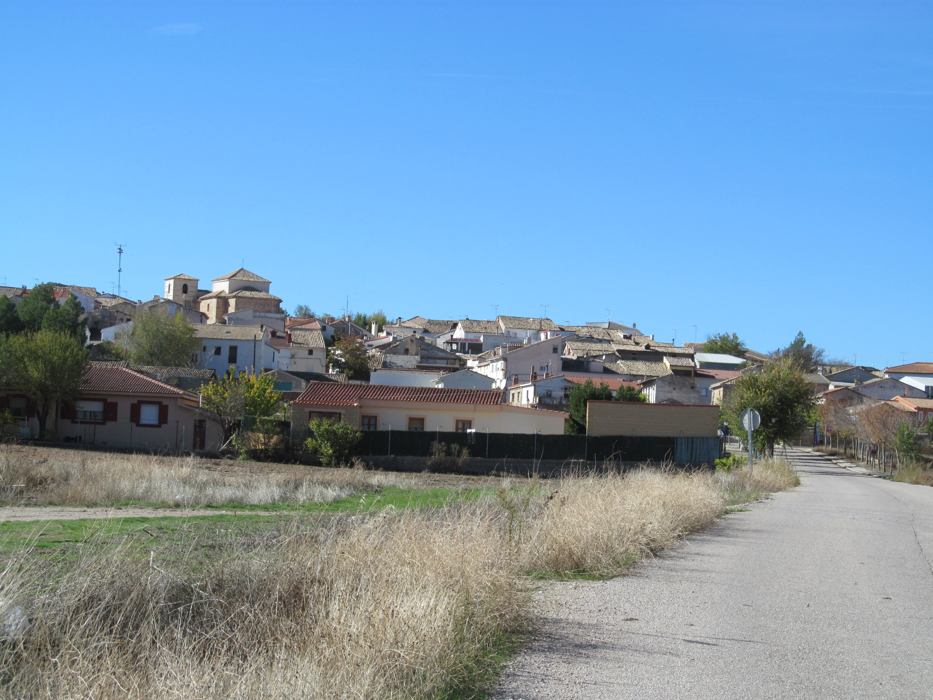 Sayatón-Vista parcial de la villa.